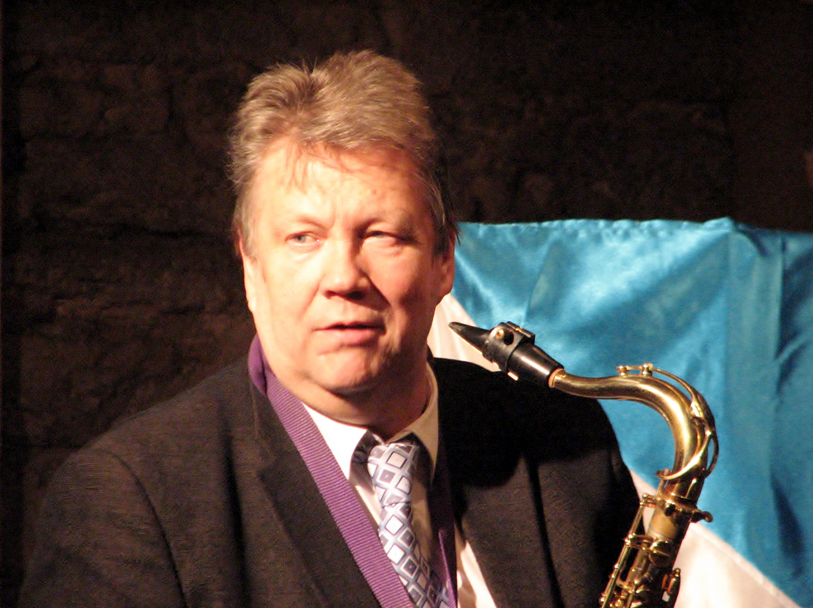 Lembit Saarsalu esinemas Vadja keele sõnaraamatu esitlusel Kloostri aidas